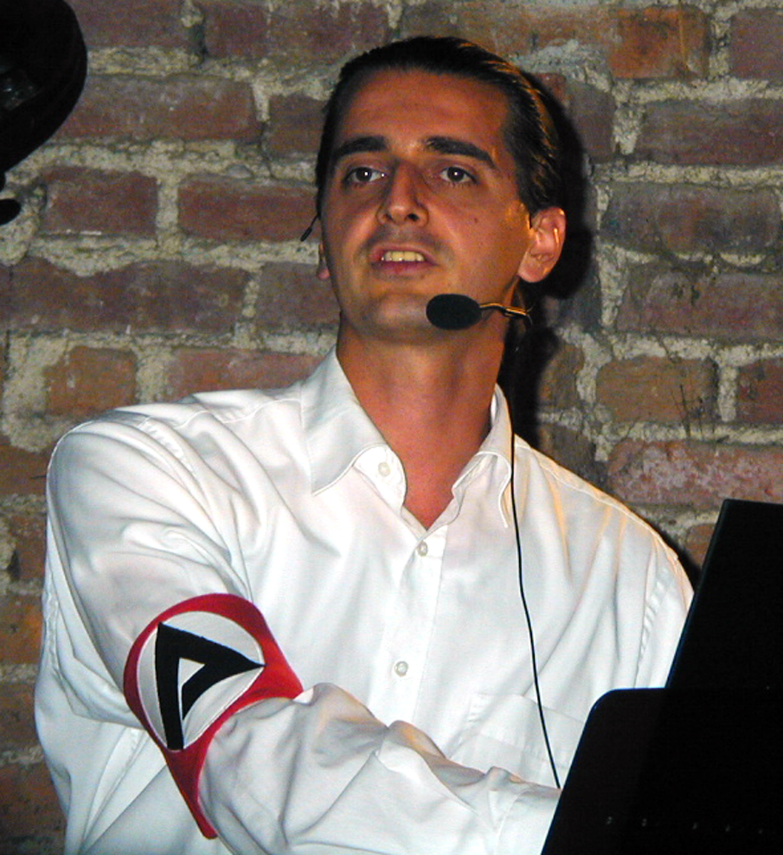 Hagen Rether mit Arbeitsamt-Armbinde bei einem seiner ersten Auftritte in München 2004